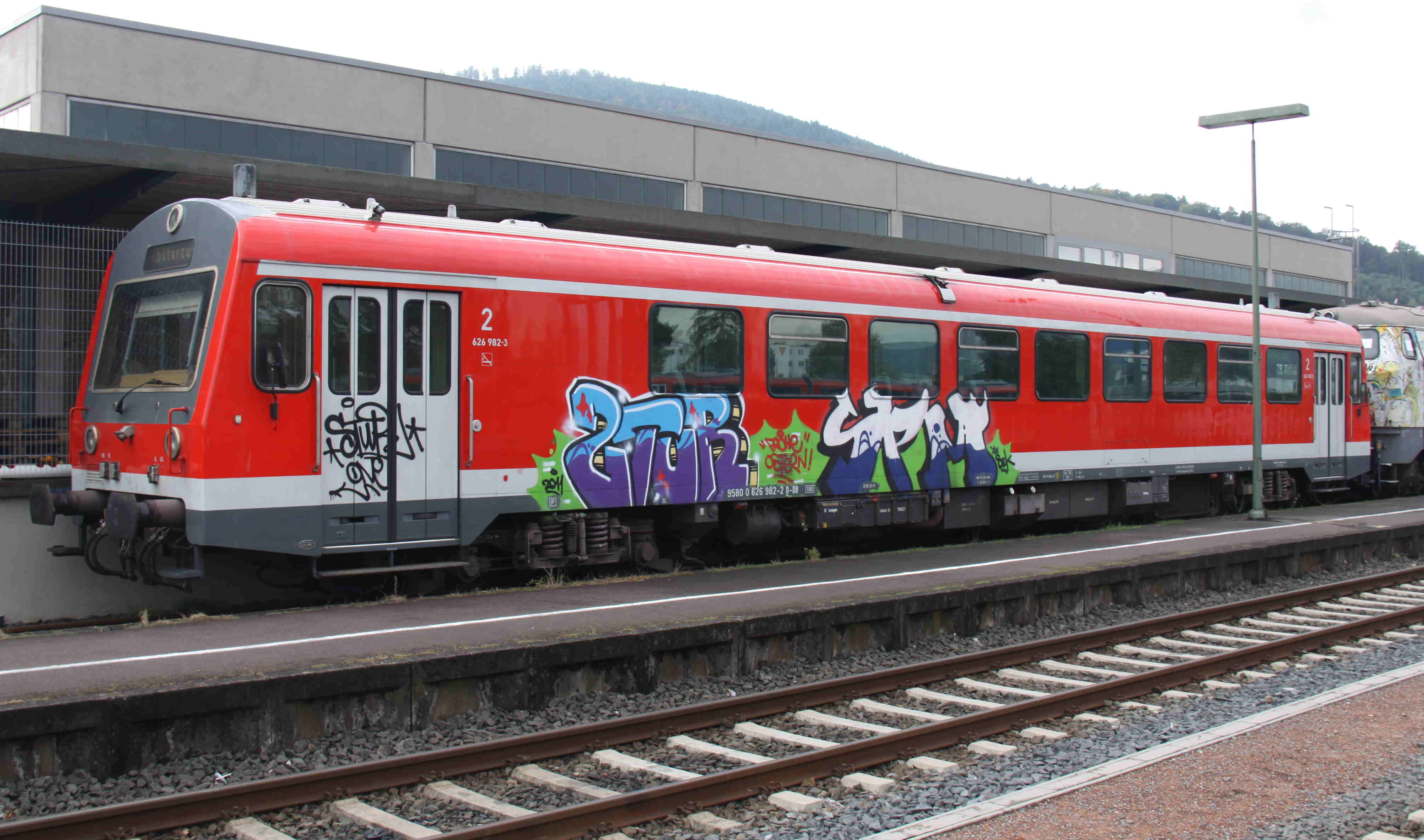 Triebwagen 626 982 in Miltenberg